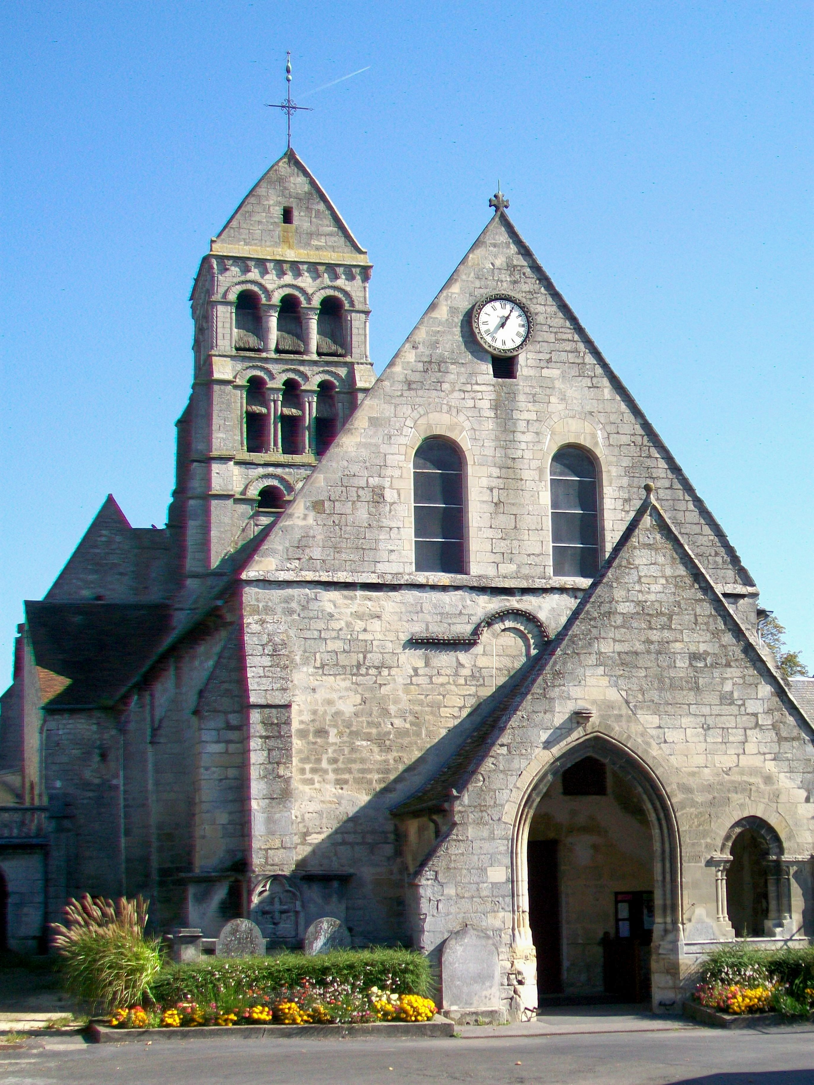 L'église romane Sainte-Maure-et-Sainte-Brigide du XIe siècle, façade occidentale.